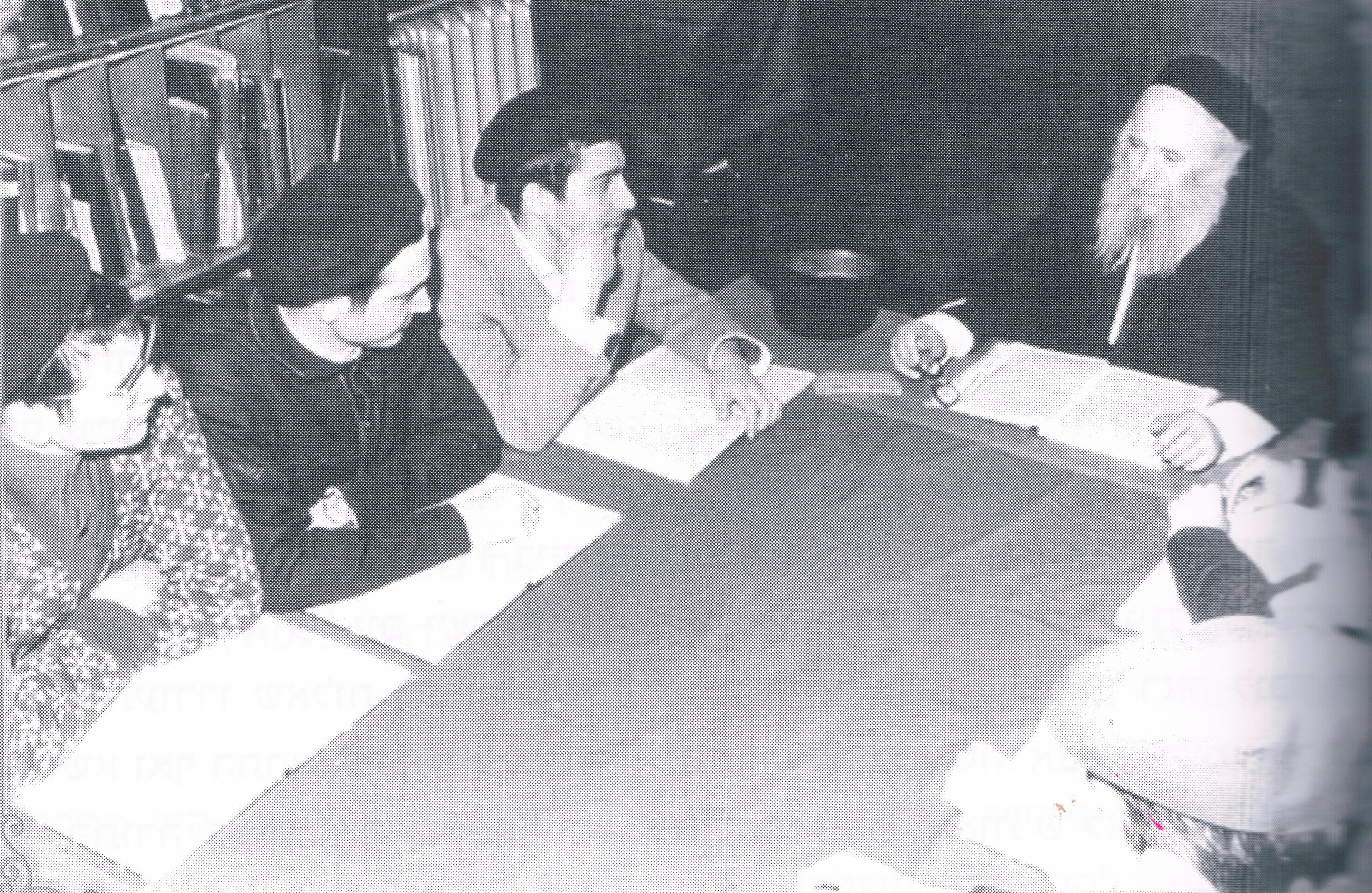 מימין לשמאל: הרב חיים חייקין, רפאל בנאקום, ?, עזריאל לוי